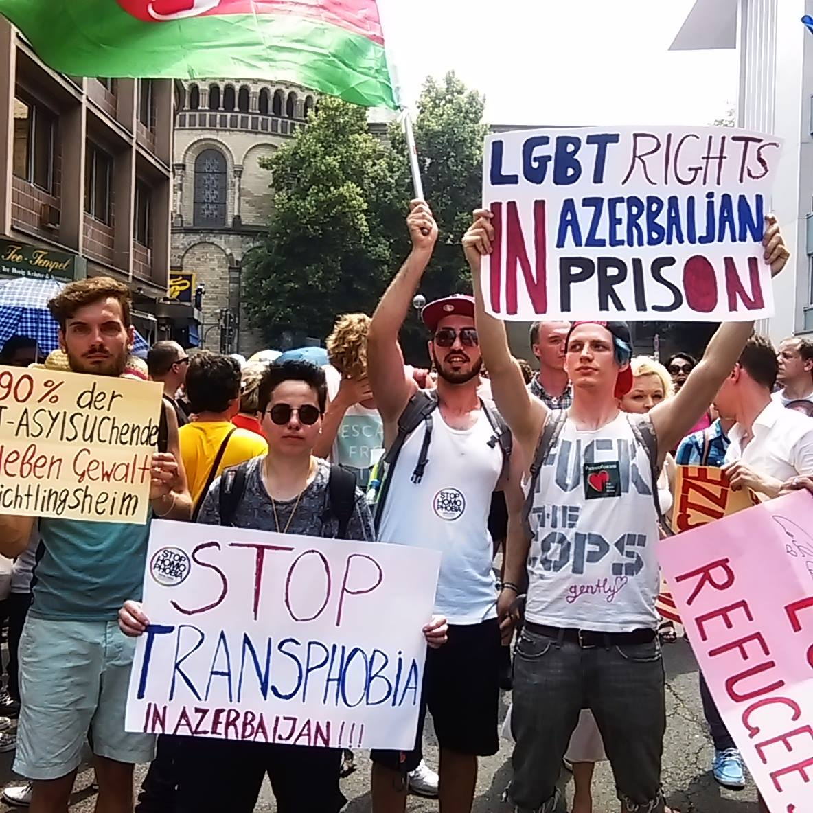 Азербайджанские ЛГБТ-активисты на гей-параде в Германии